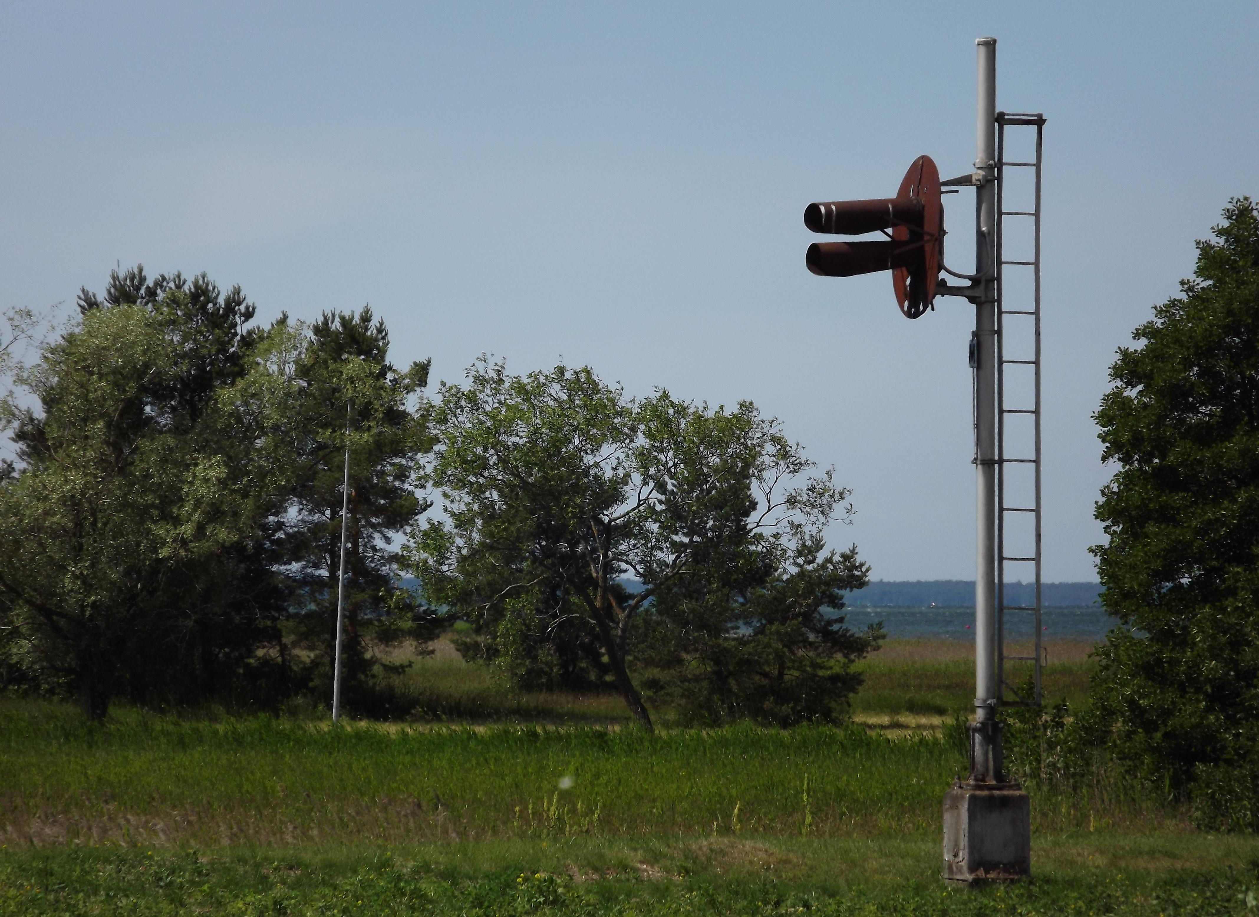 Rohuküla raudtee foor Haapsalus.